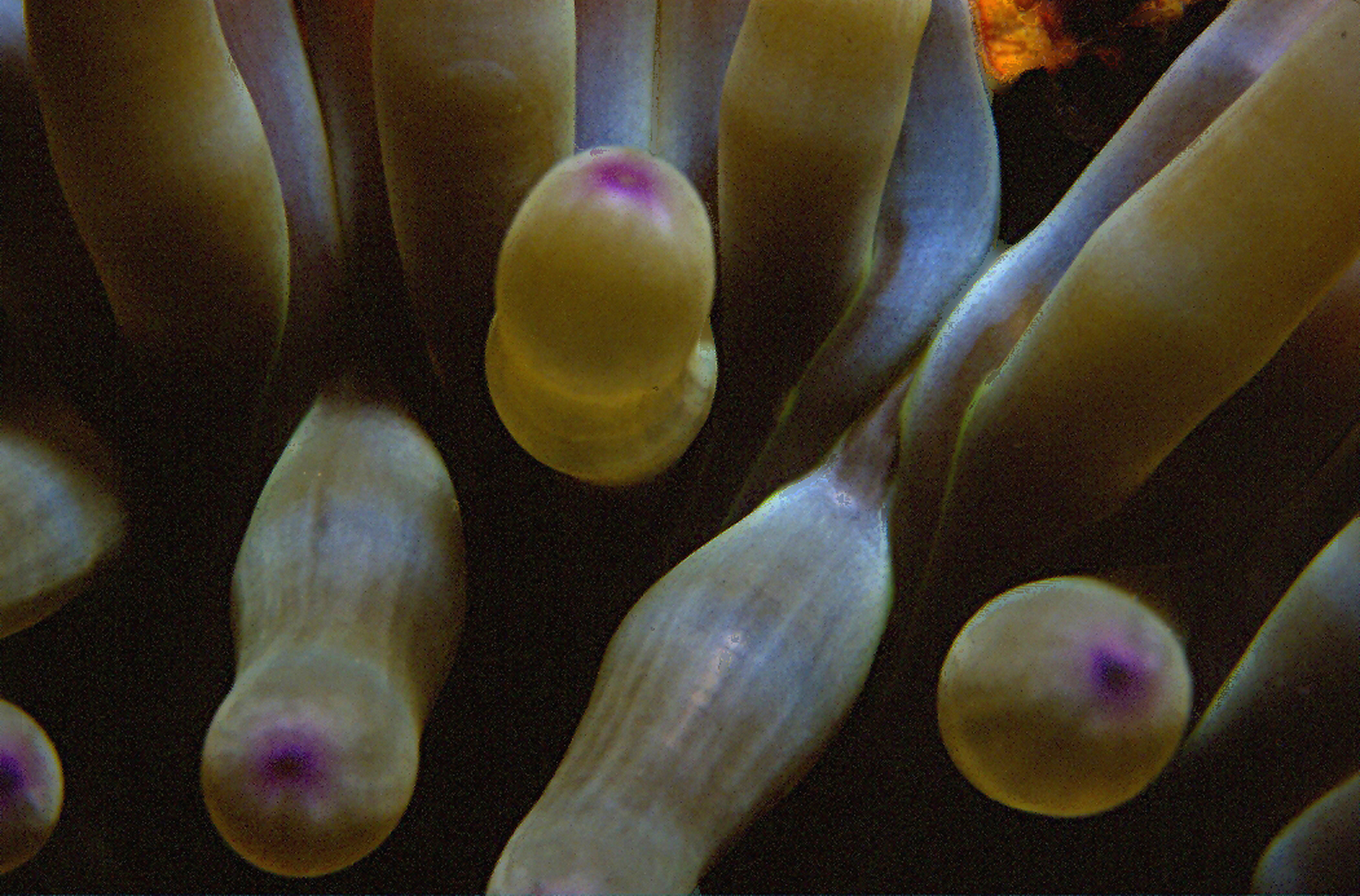 Condylactis aurantiaca (della Chiaje, 1825) - Banyuls-sur-Mer : 07/88